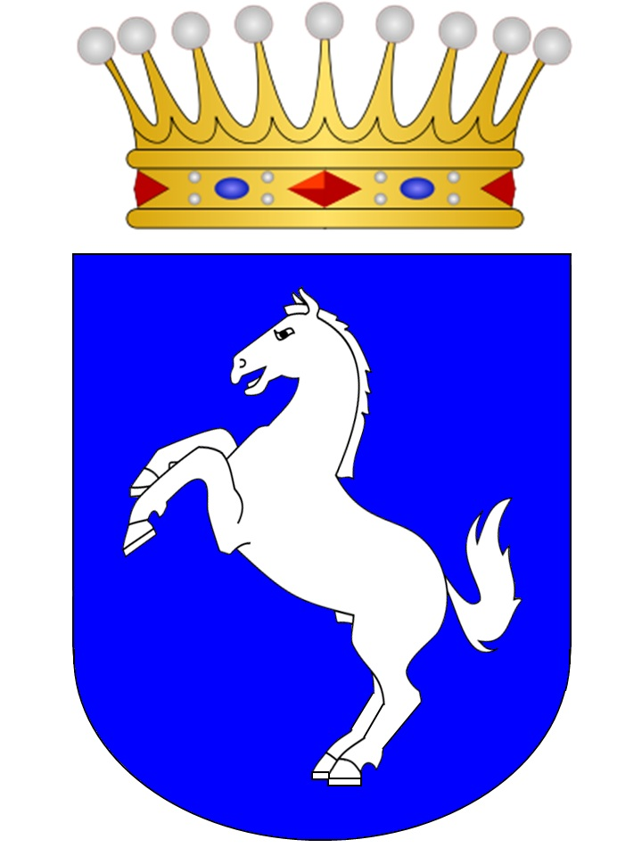 In blau ein silberner Hengst nach vorwärts springend.